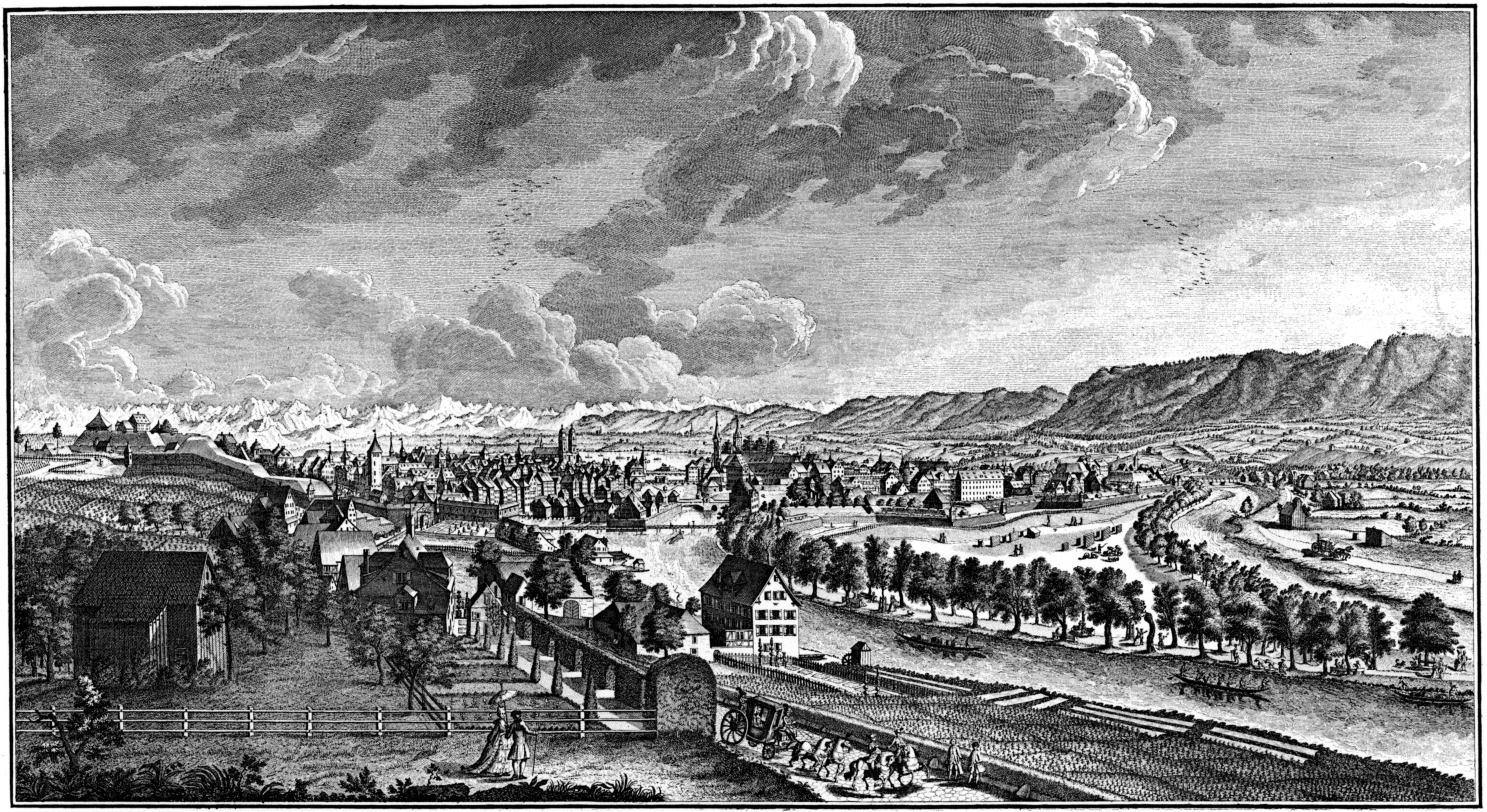 Zürich vom Stampfenbach her. Radierung von Johann Rudolf Holzhalb nach einer Zeichnung von Johann Jakob Koller 1781. Zentralbibliothek Zürich.